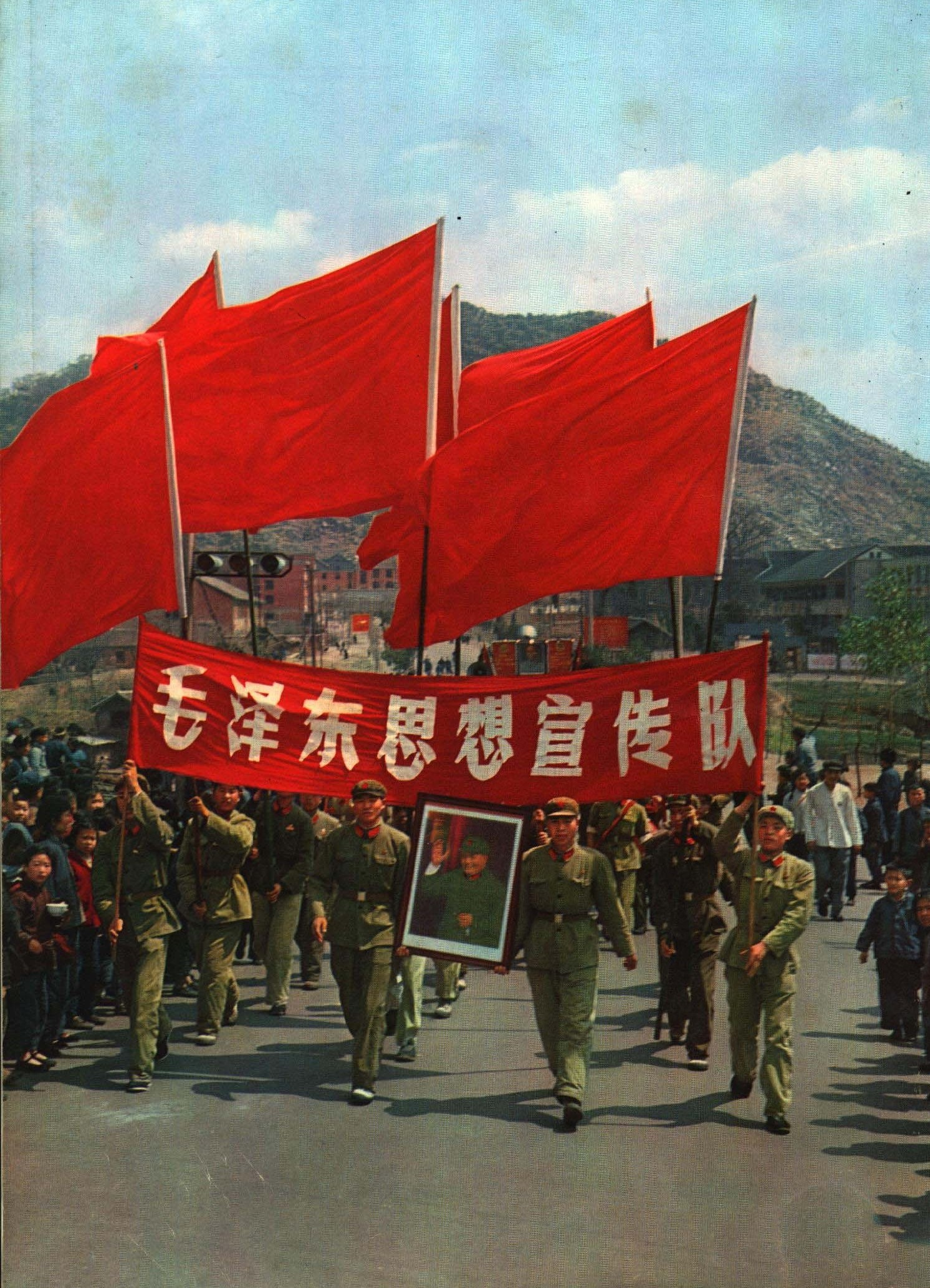 1967-06 1967年毛泽东思想宣传队